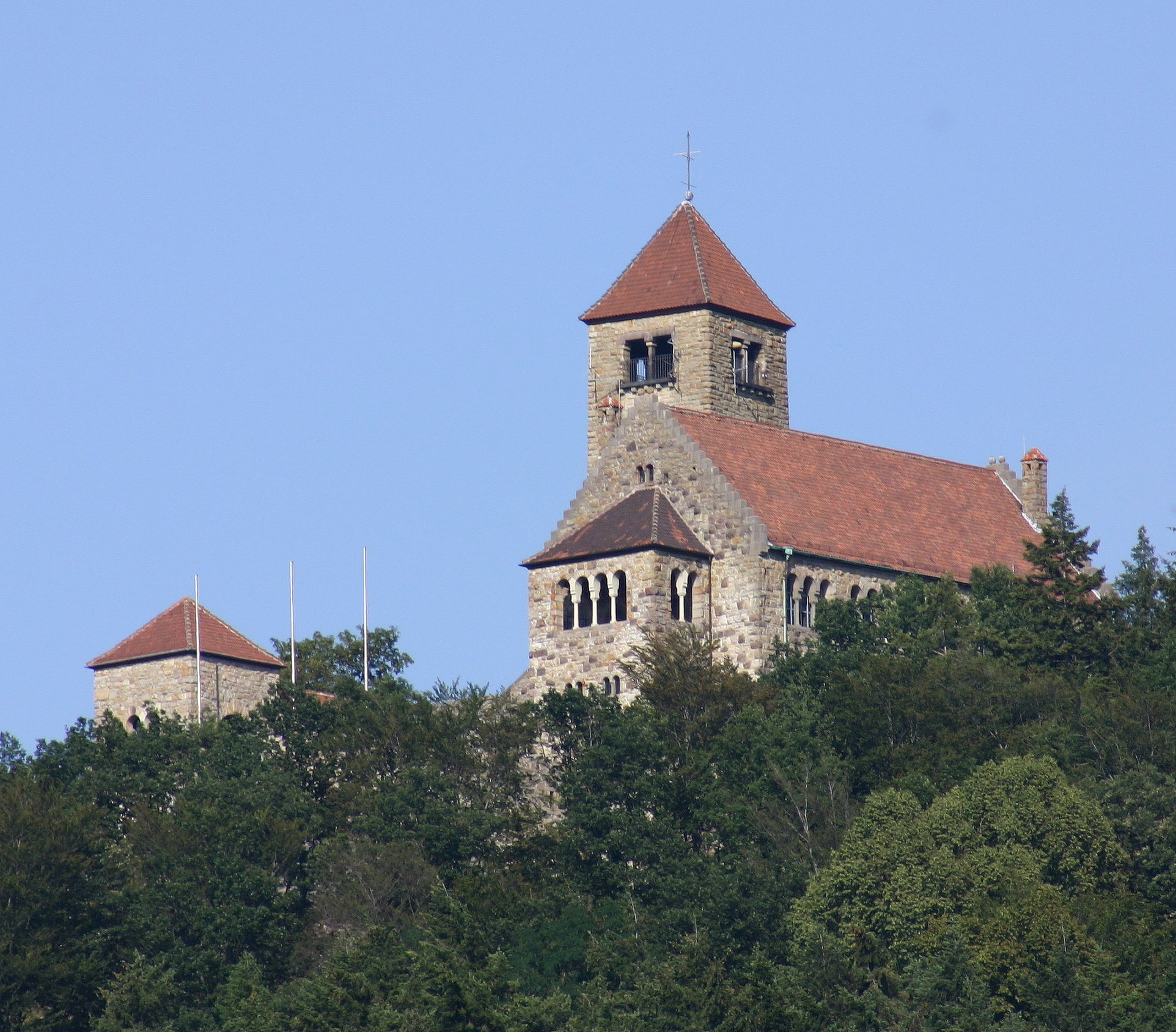 Wachenburg in Weinheim, Germany